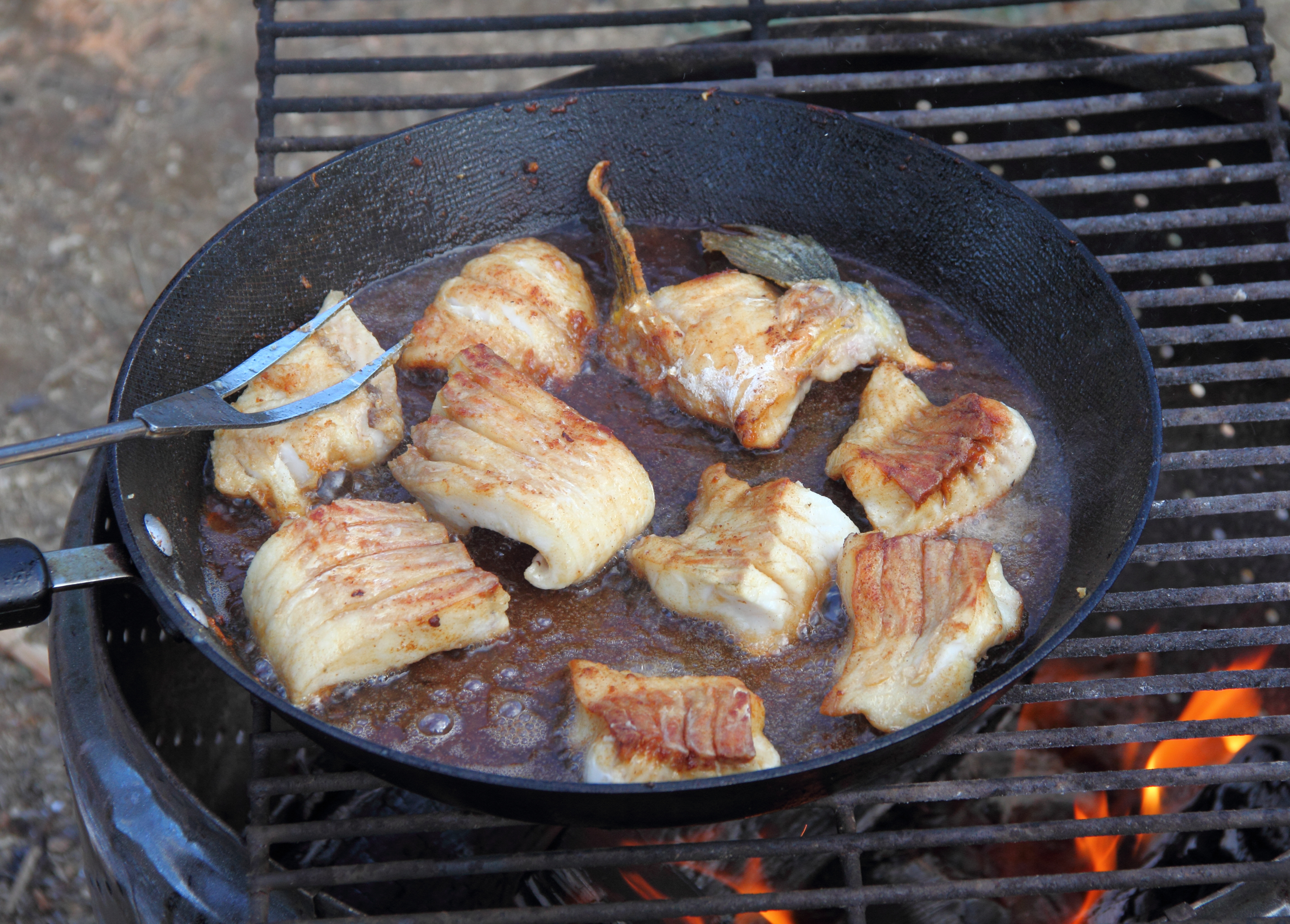 Doré sur le feu